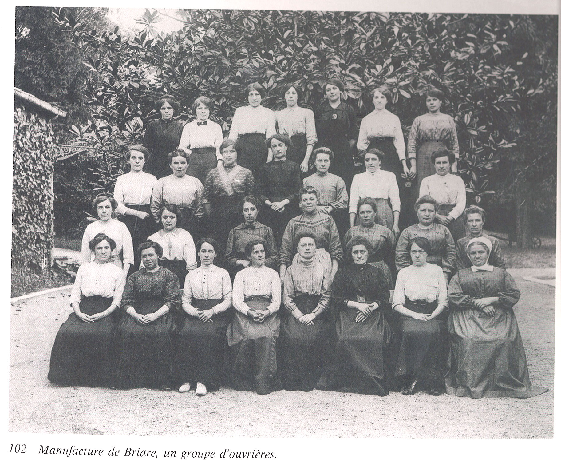 Des employées de la manufacture des Émaux de Briare.